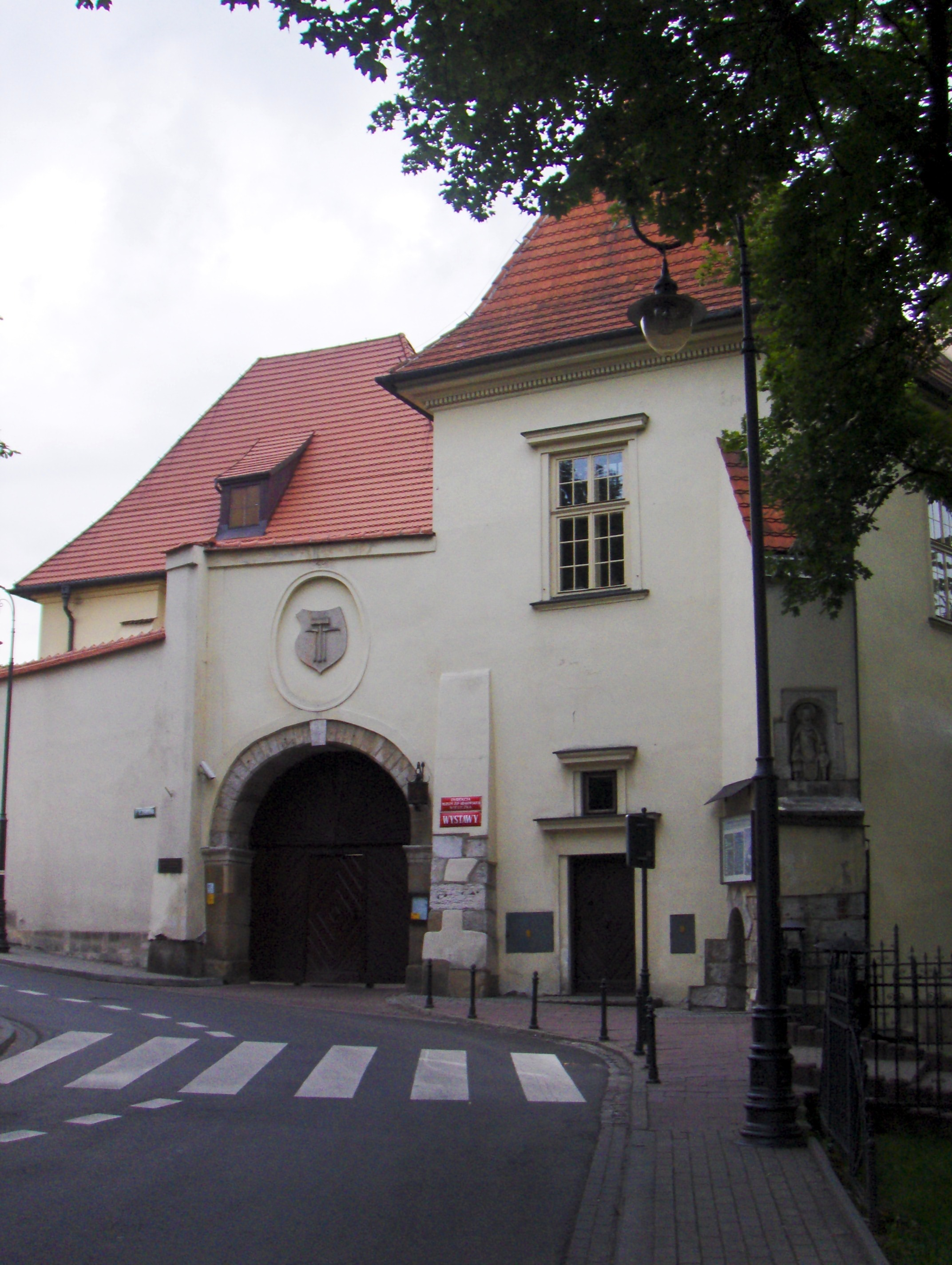 Zamek Żupny w Wieliczce